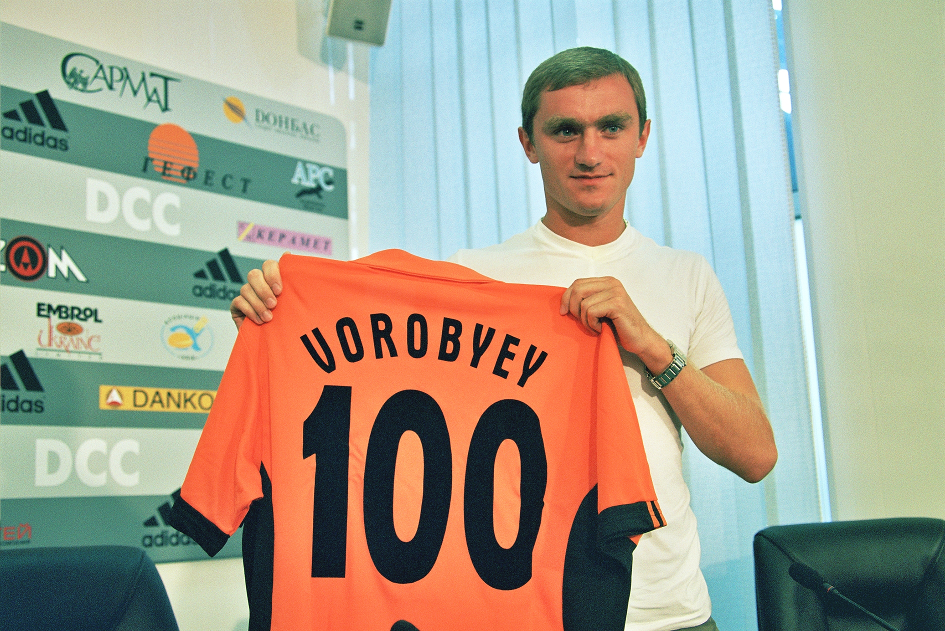 Фото Анастасии Федоренко